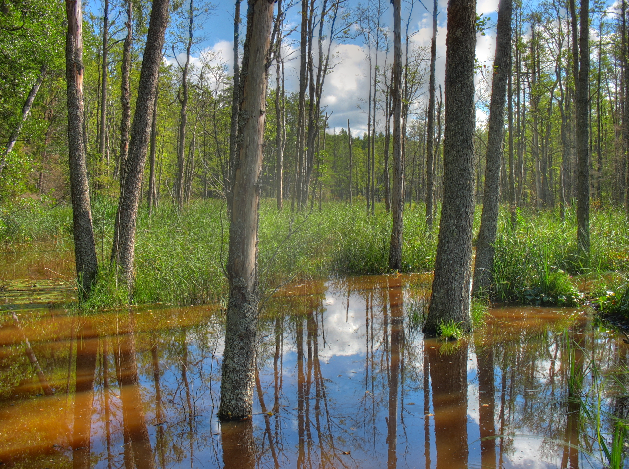 Unnamed Road, Sējas novads, LV-2142, Latvia